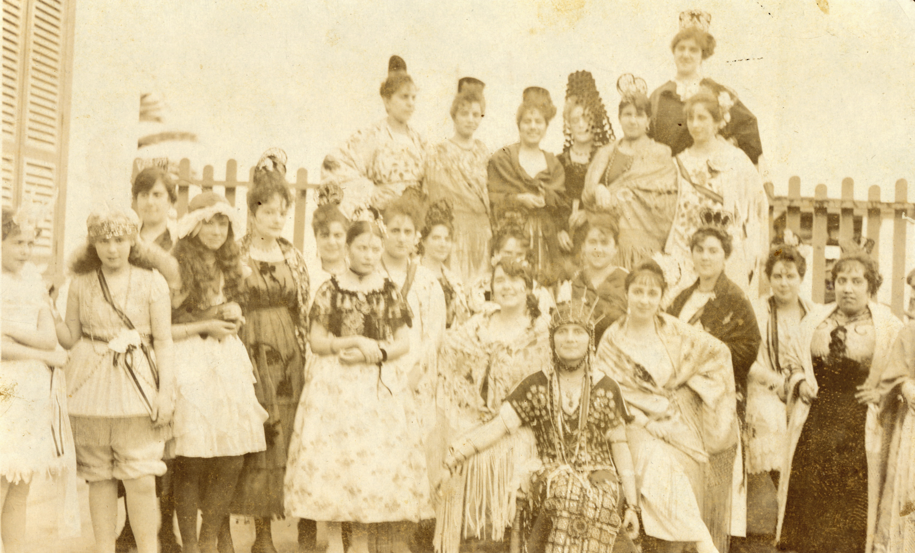 Retrato de carnaval. Las Palmas de Gran Canaria (Gran Canaria). Islas Canarias, España.